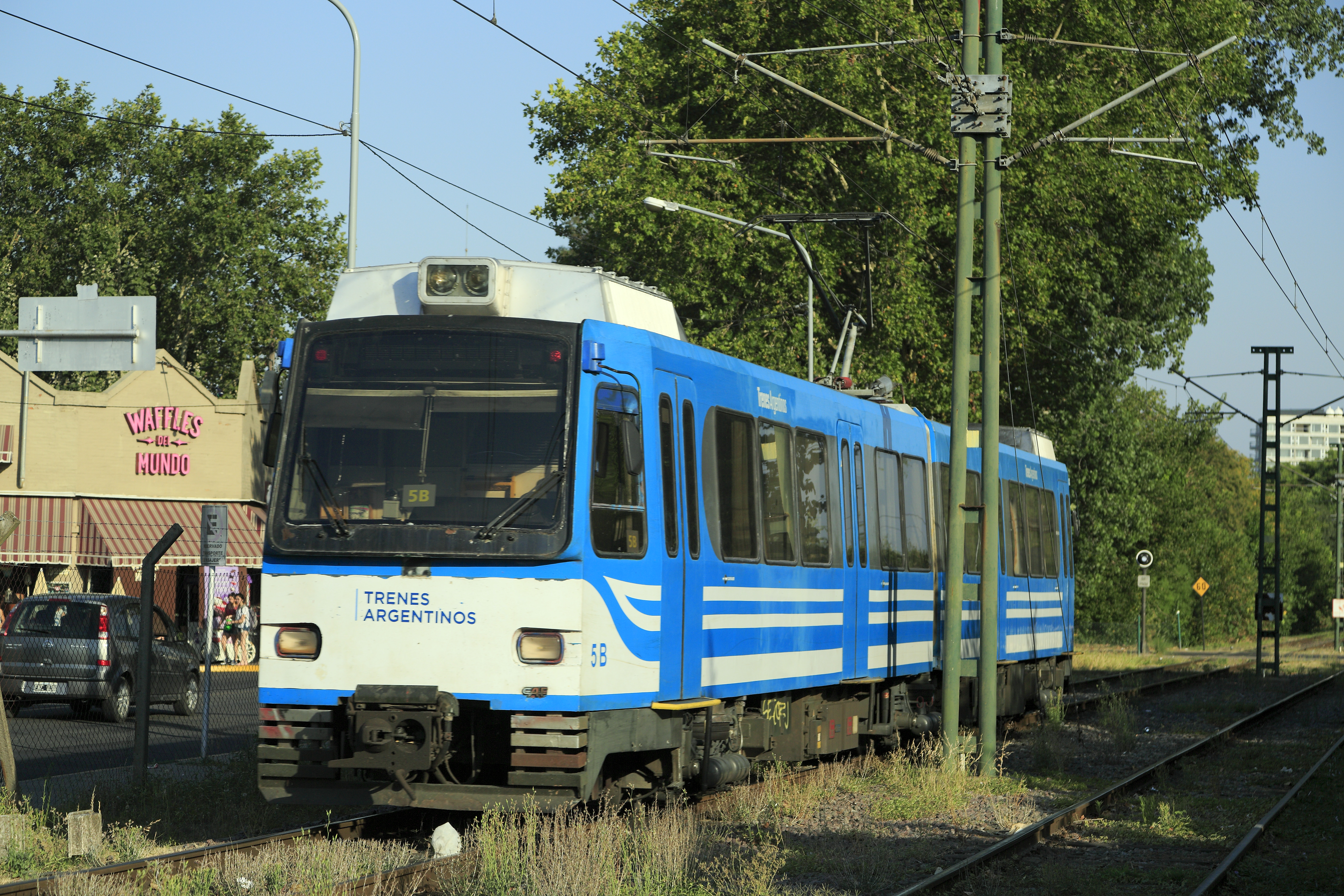 Zug Delta–Maipú, Nachschuss vom Wegübergang Calle Salta